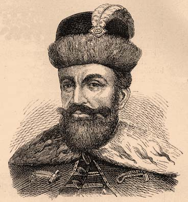 Perényi Péter (1502.? – 1548 január) koronaőr, erdélyi vajda. Perényi Imre nádor fia, Perényi Ferenc püspök testvére.